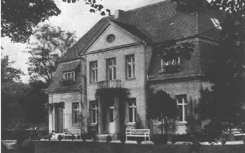 Das Wohnhaus Fritz Bleichröder in Berlin-Pankow, Ansicht vom Garten (Wände in gelbem Spritzputz, Muschelkalkstein-Säulen, rotes Biberschwanzdoppeldach)